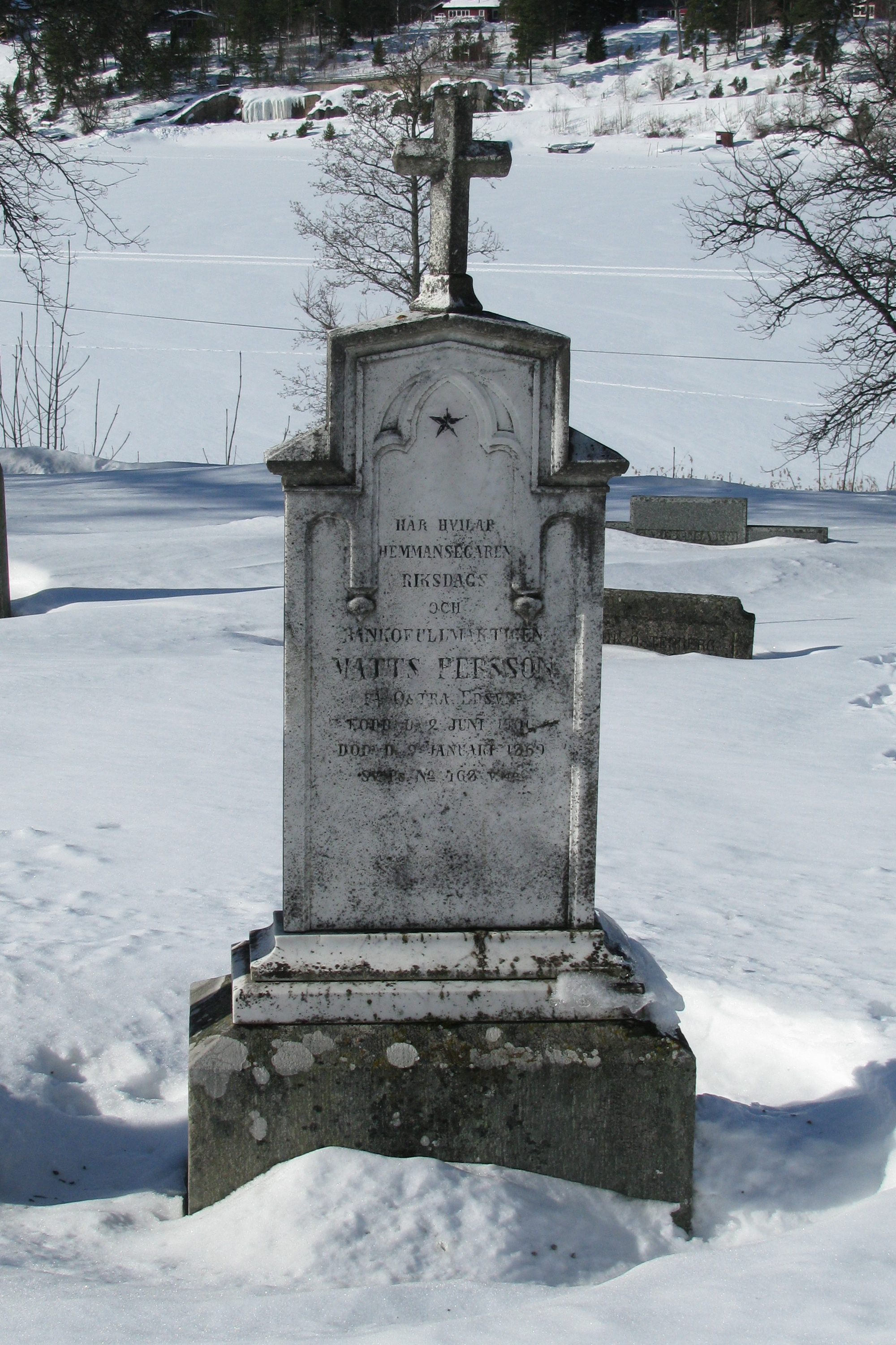 Riksdagsmannen Matts Perssons grav vid Vätö kyrka. Källa: eget foto, fotograf EnDumEn, 9 mars 2010